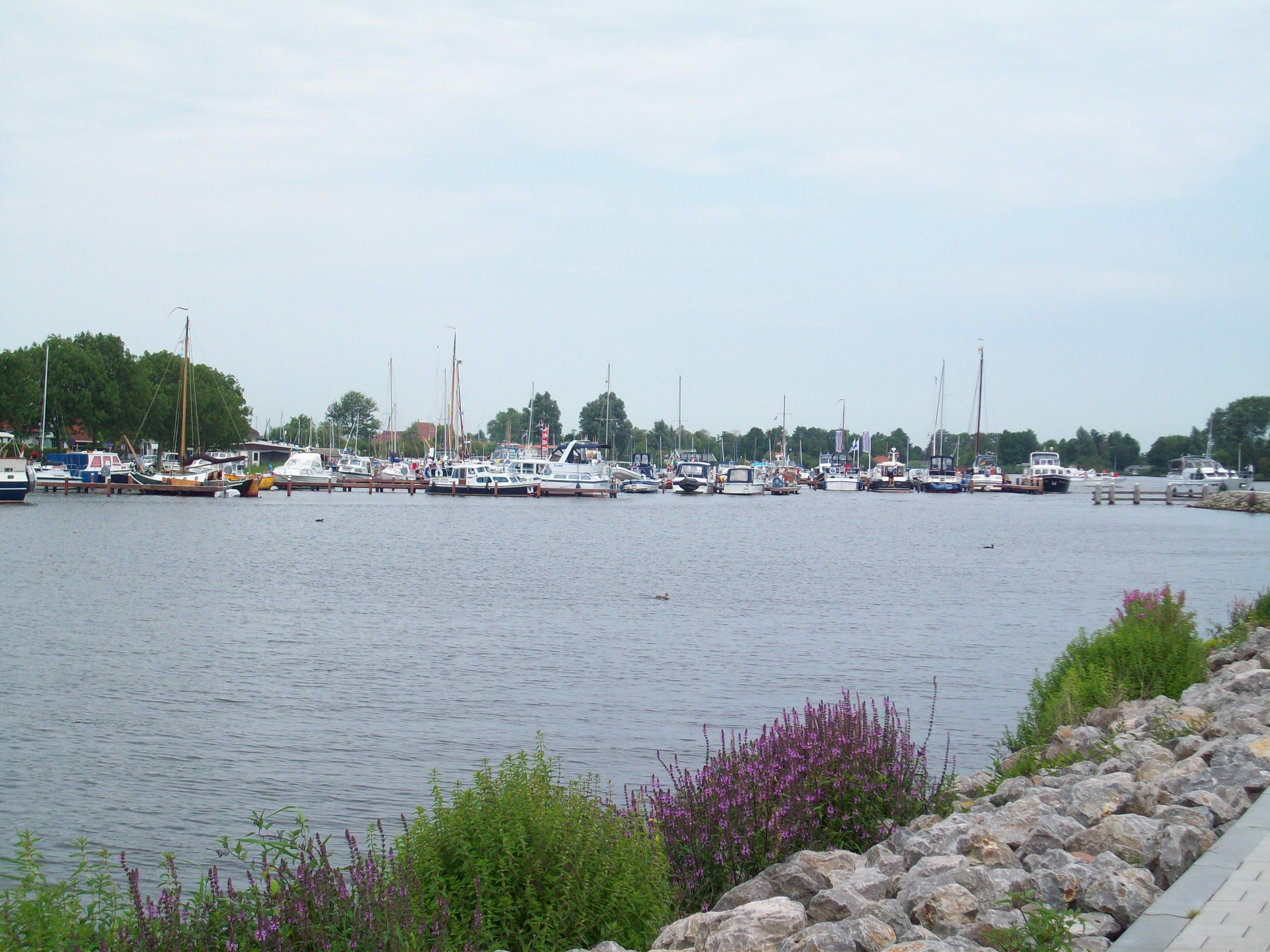 Grouw